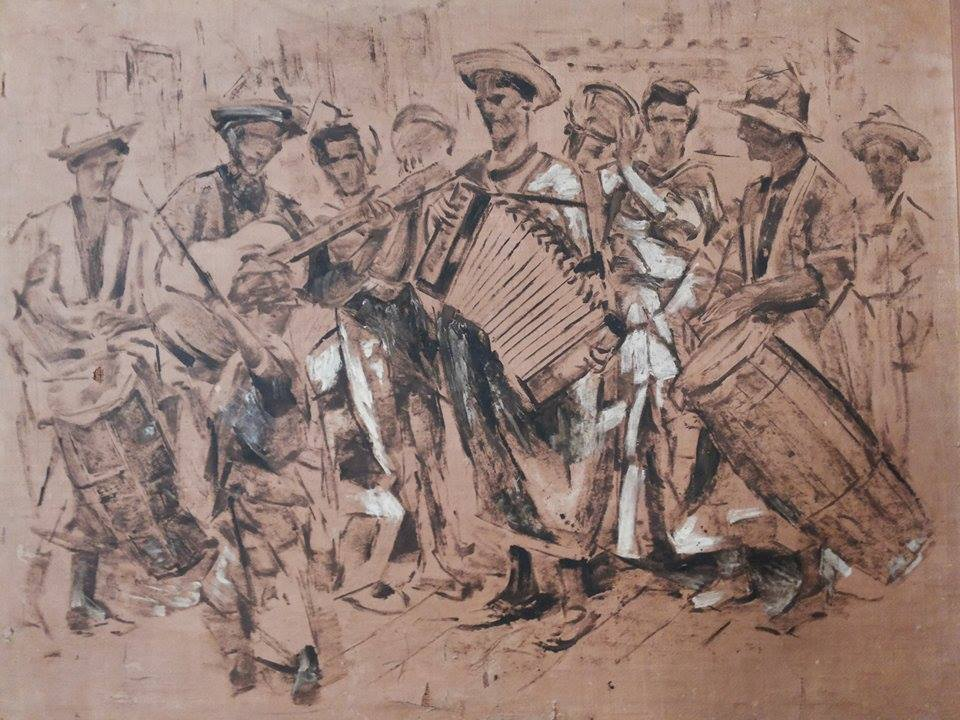 Escena de carnaval EDKabregu